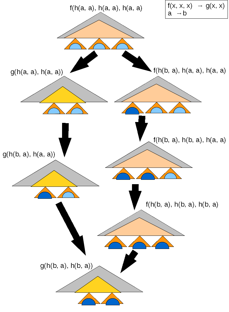 Exemple où on constate confluence locale car la seconde réécriture réécrit dans la partie de la substitution de la première